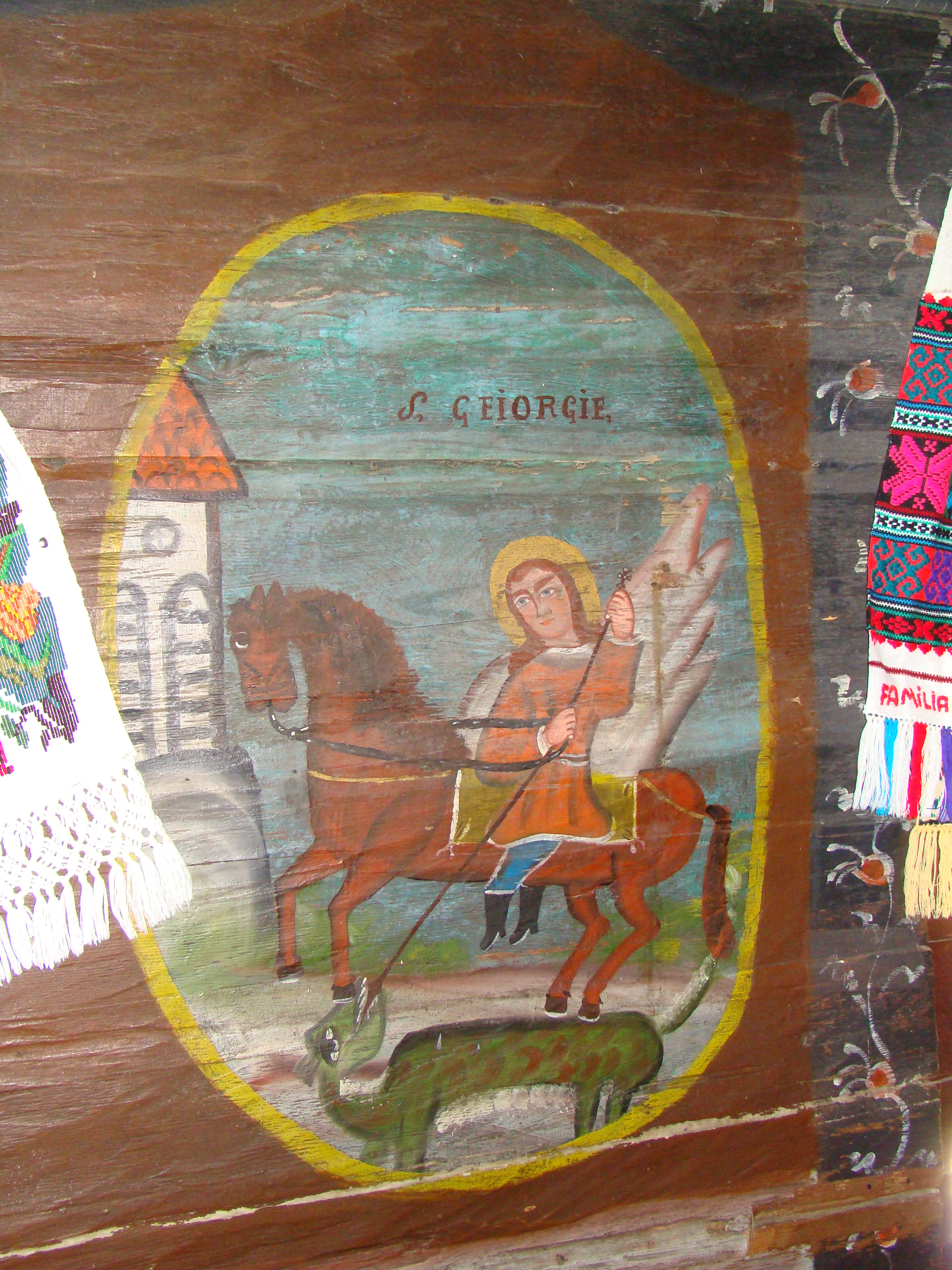 Biserica de lemn din Poiana Botizii-interioare